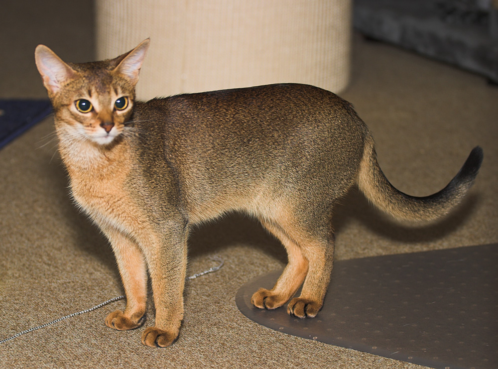 Gatobelo's Kamée (Abessinierkatze wildfarben, 7 Monate alt)